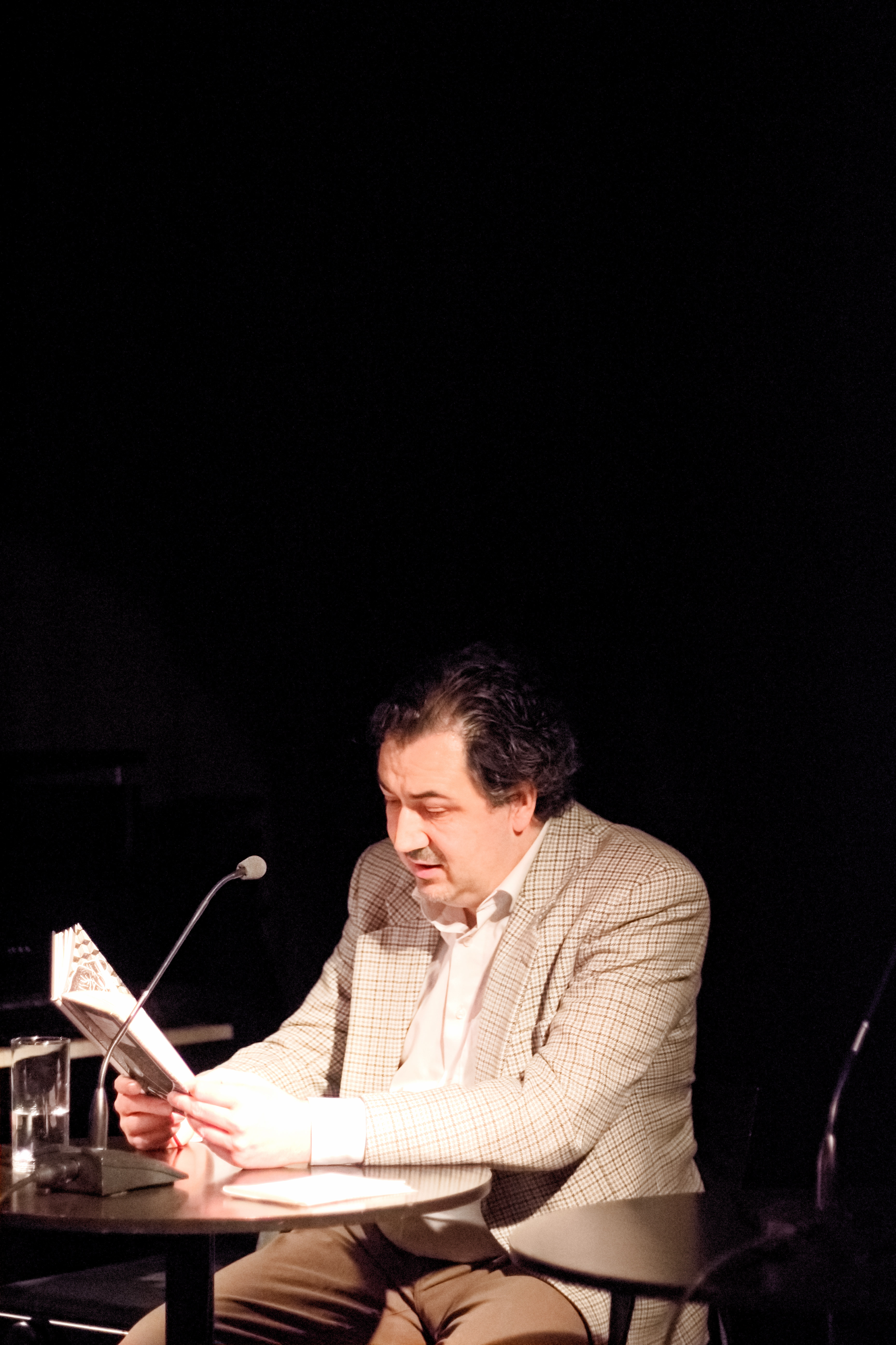 Der österreichische Schriftsteller und Journalist Alexander Peer bei einem Leseauftritt im Salzburger Literaturhaus im März 2018.